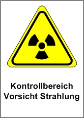 Schild zur Kennzeichnung eines Kontrollbereiches gem. deutscher Strahlenschutzverordnung (StrlSchV)